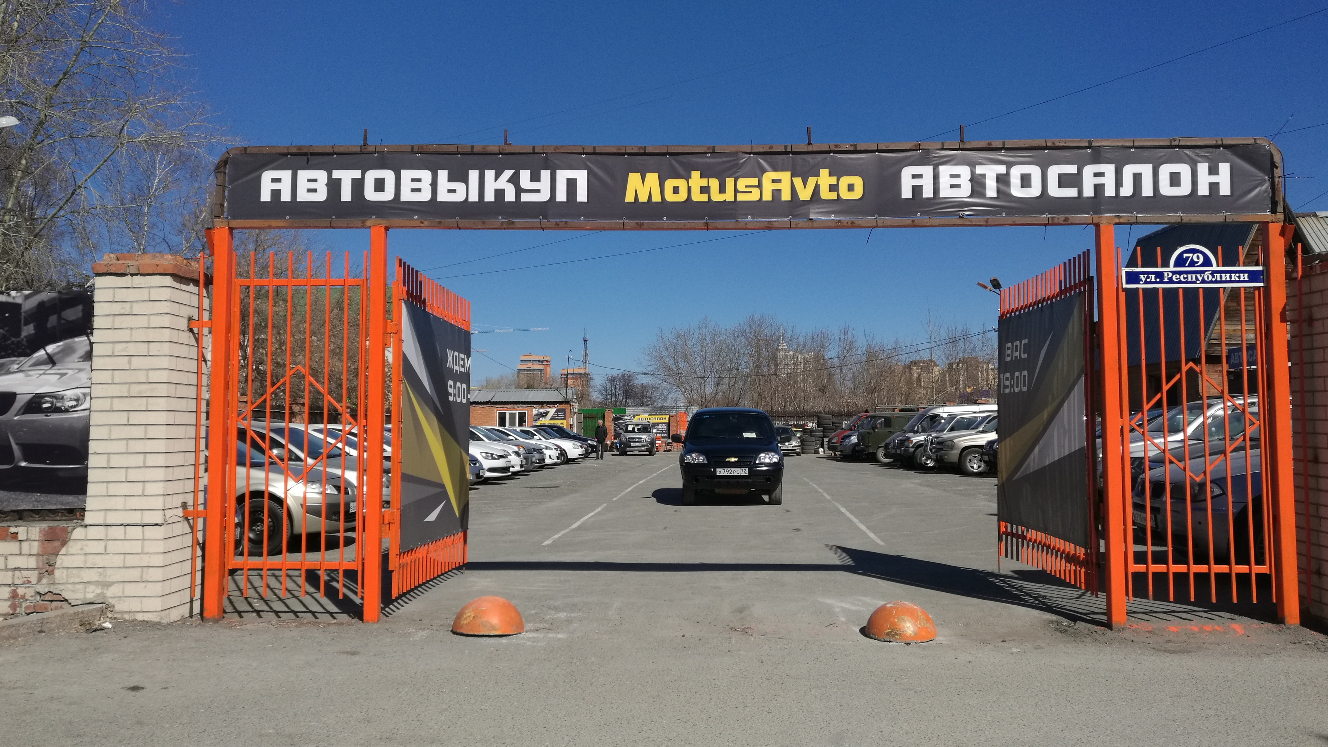 Aŭtobazaro en strato Respubliko. Tjumeno, Rusio.